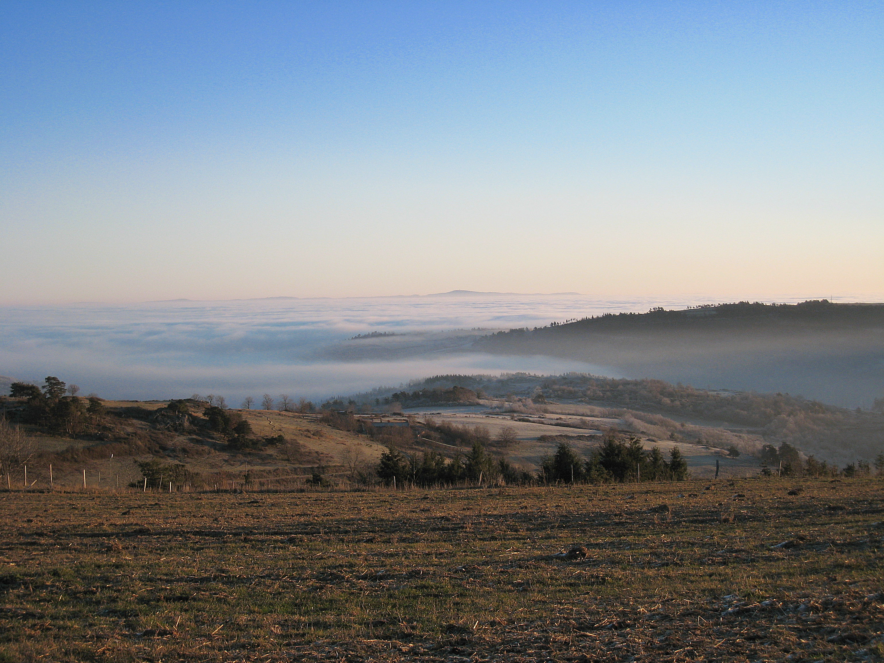 La plaine du Forez dans le brouillard - St Georges en Couzan